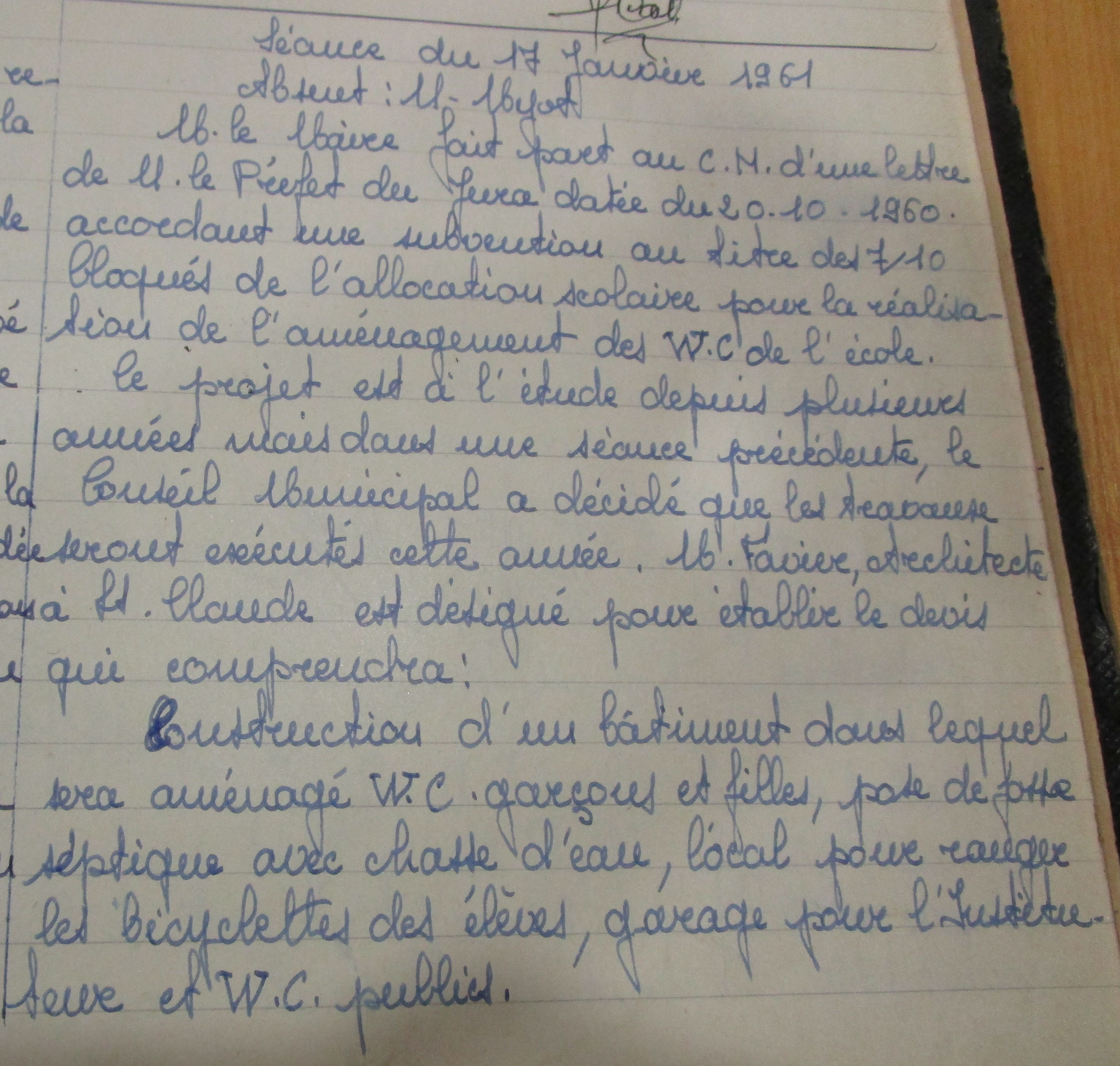 délibérations conseil municipal